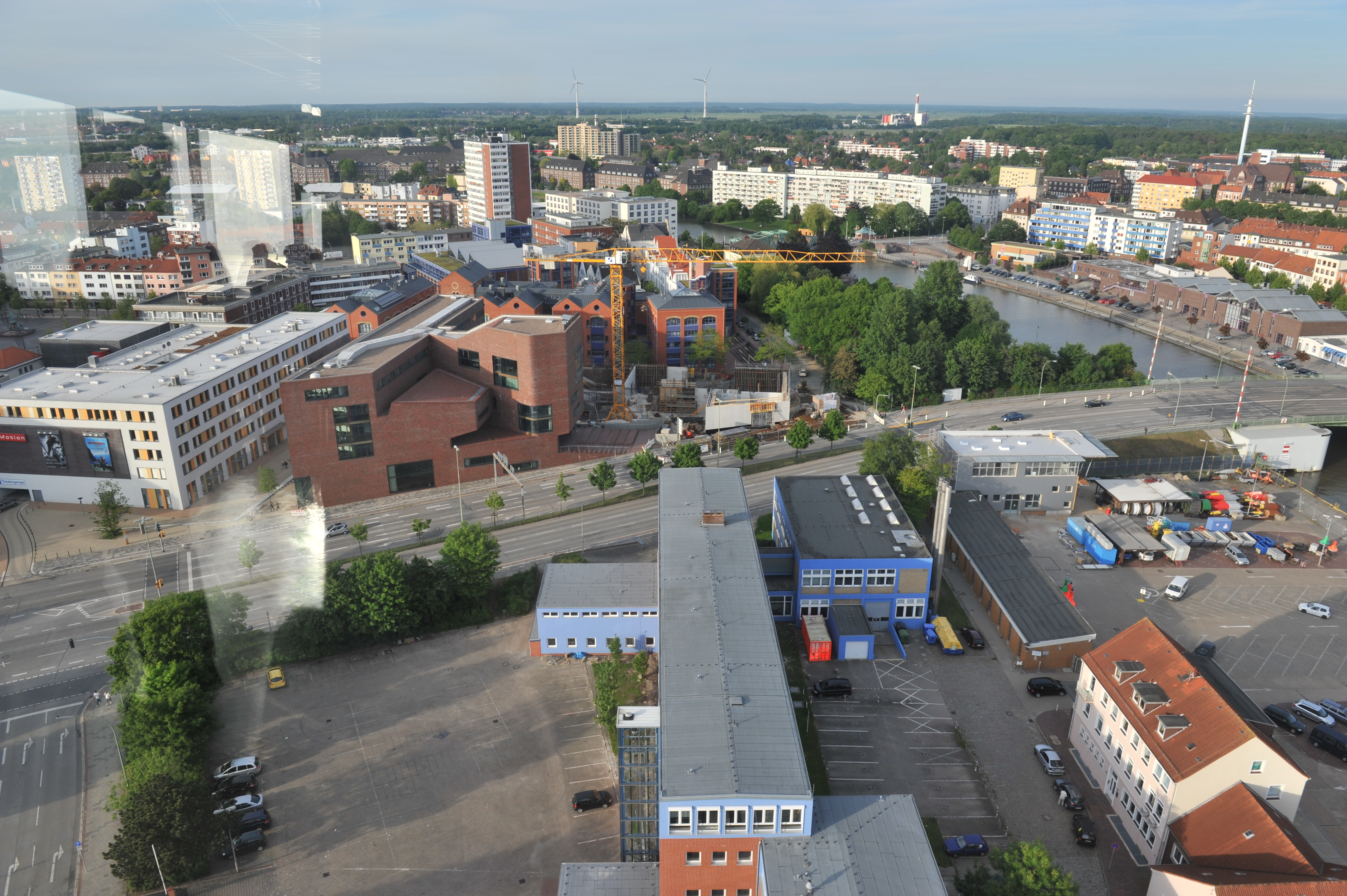 View from Richtfunkturm in Bremerhaven Hochschule